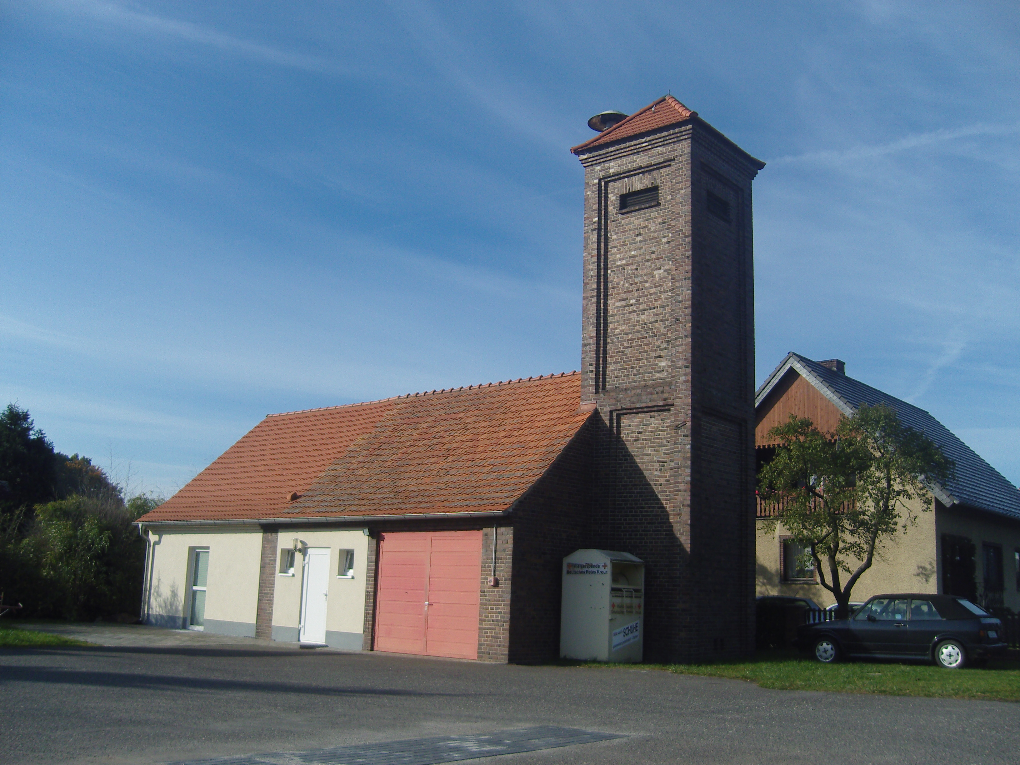 Feuerwehrgerätehaus in Buchwäldchen, Gemeinde Luckaitztal